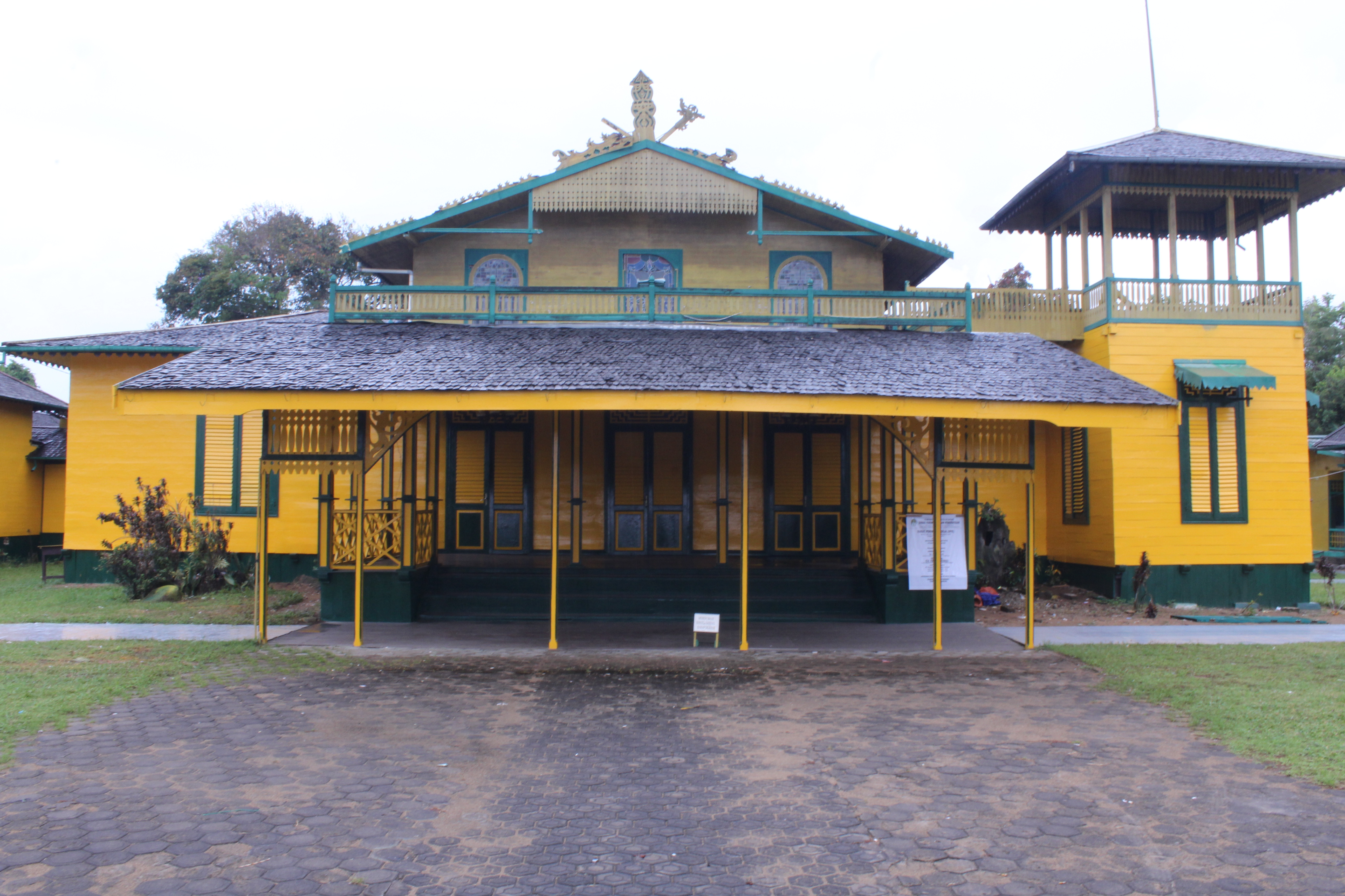 Keraton Kerajaan Matan terletak di Mulia Kerta, Benua Kayong, Kabupaten Ketapang, Kalimantan Barat